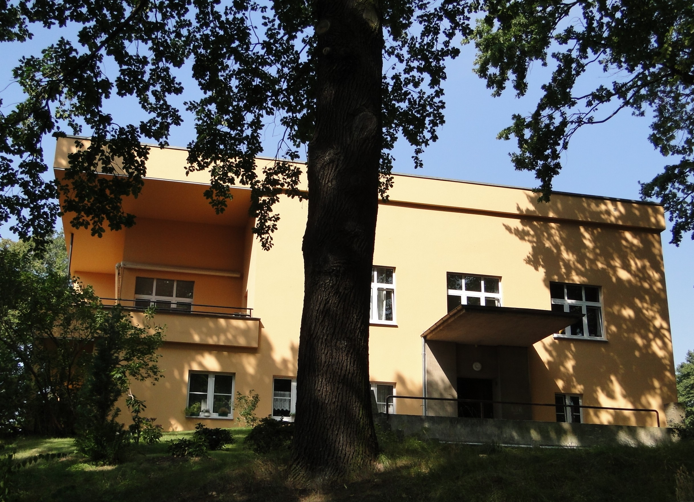 Denkmalgeschützte Villa in der Wollnerstraße 3 in Dresden-Wachwitz